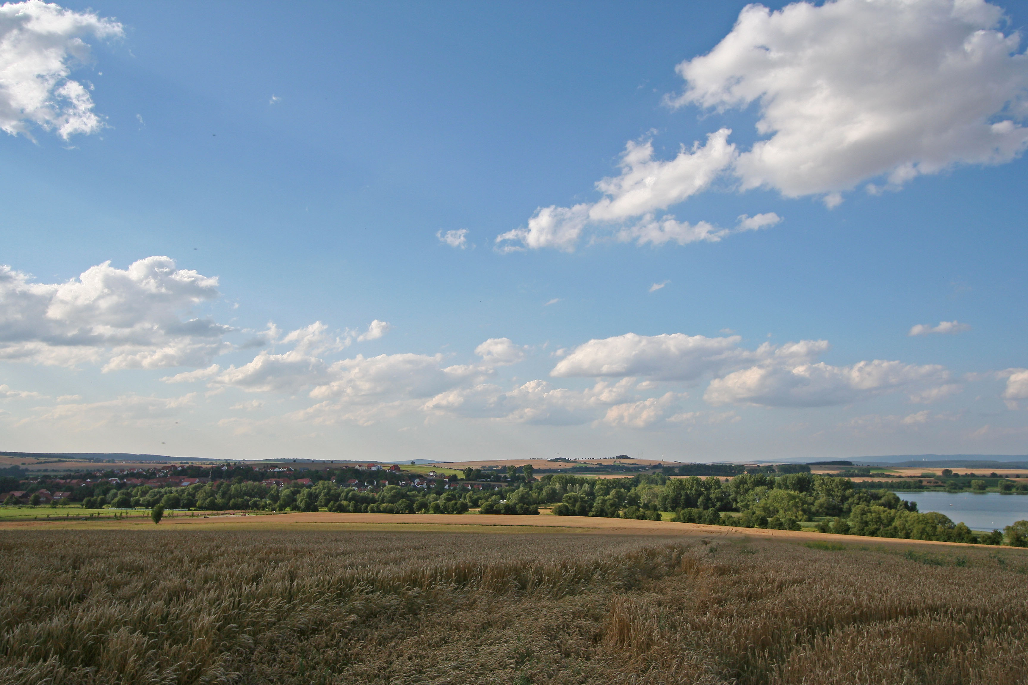 Seeburg